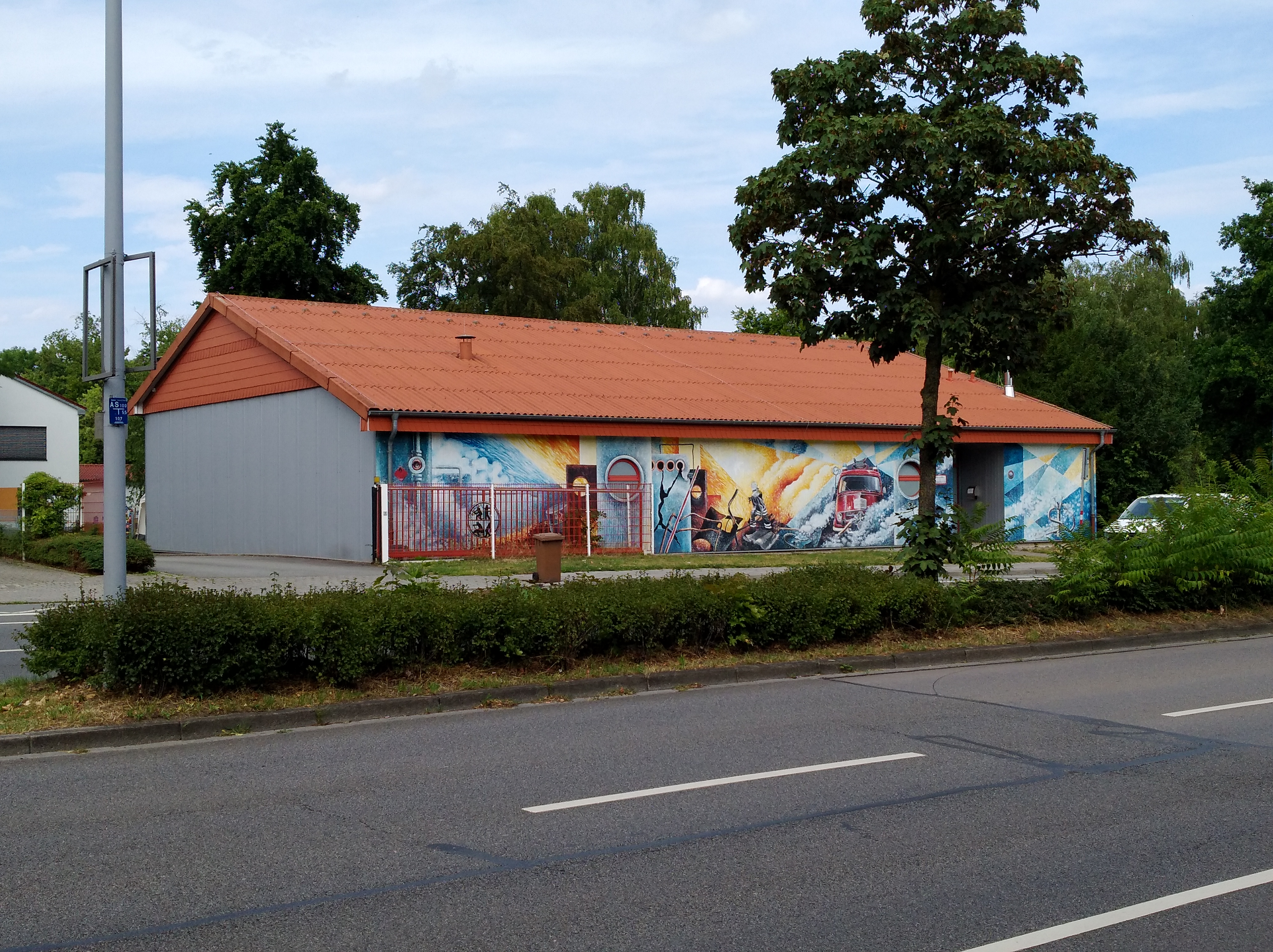 Feuerwehrhaus der Ortsfeuerwehr Stadtmitte der Freiwilligen Feuerwehr Osnabrück, Kurt-Schumacher-Damm